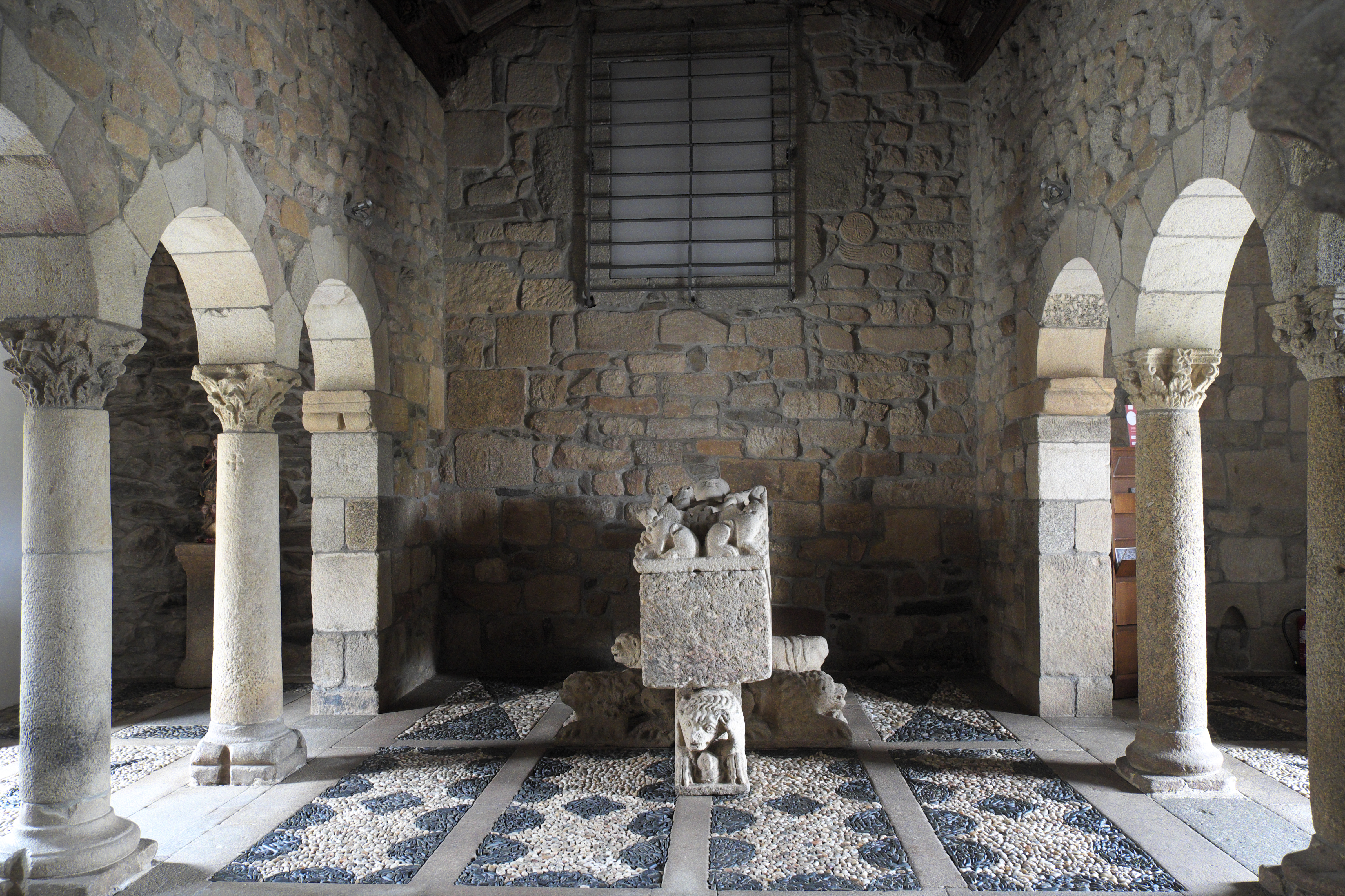 Präromanische Kirche São Pedro in Balsemão, einem zur Stadt Lamego gehörenden Ort im Distrikt Viseu in Nordportugal